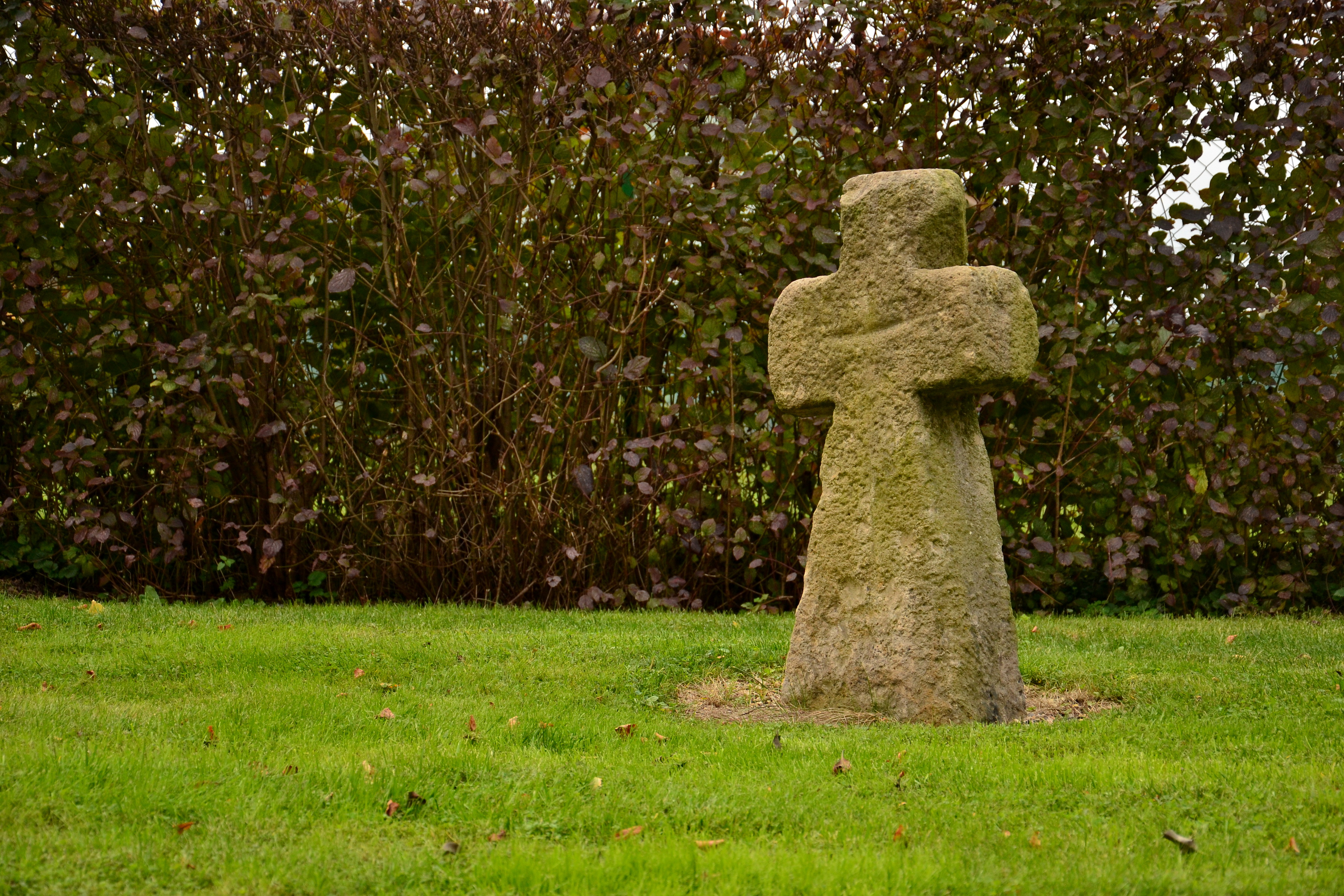 Skupina tří smírčích křížů přemístěných z Kyjic - kříž č. 2